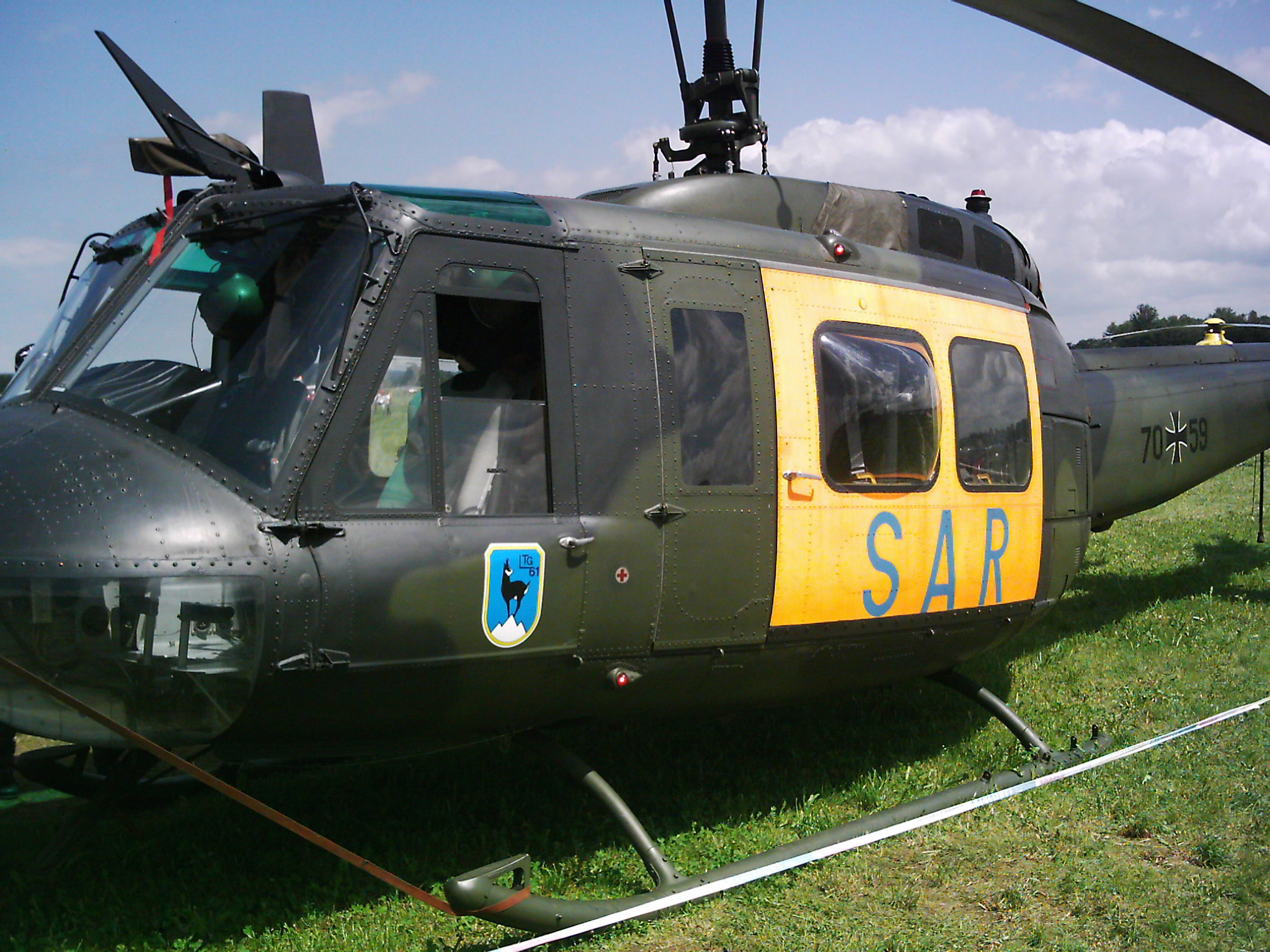 Bell UH-1D auf dem Flugplatz 88459 Tannheim, Oberschwaben, Deutschland.